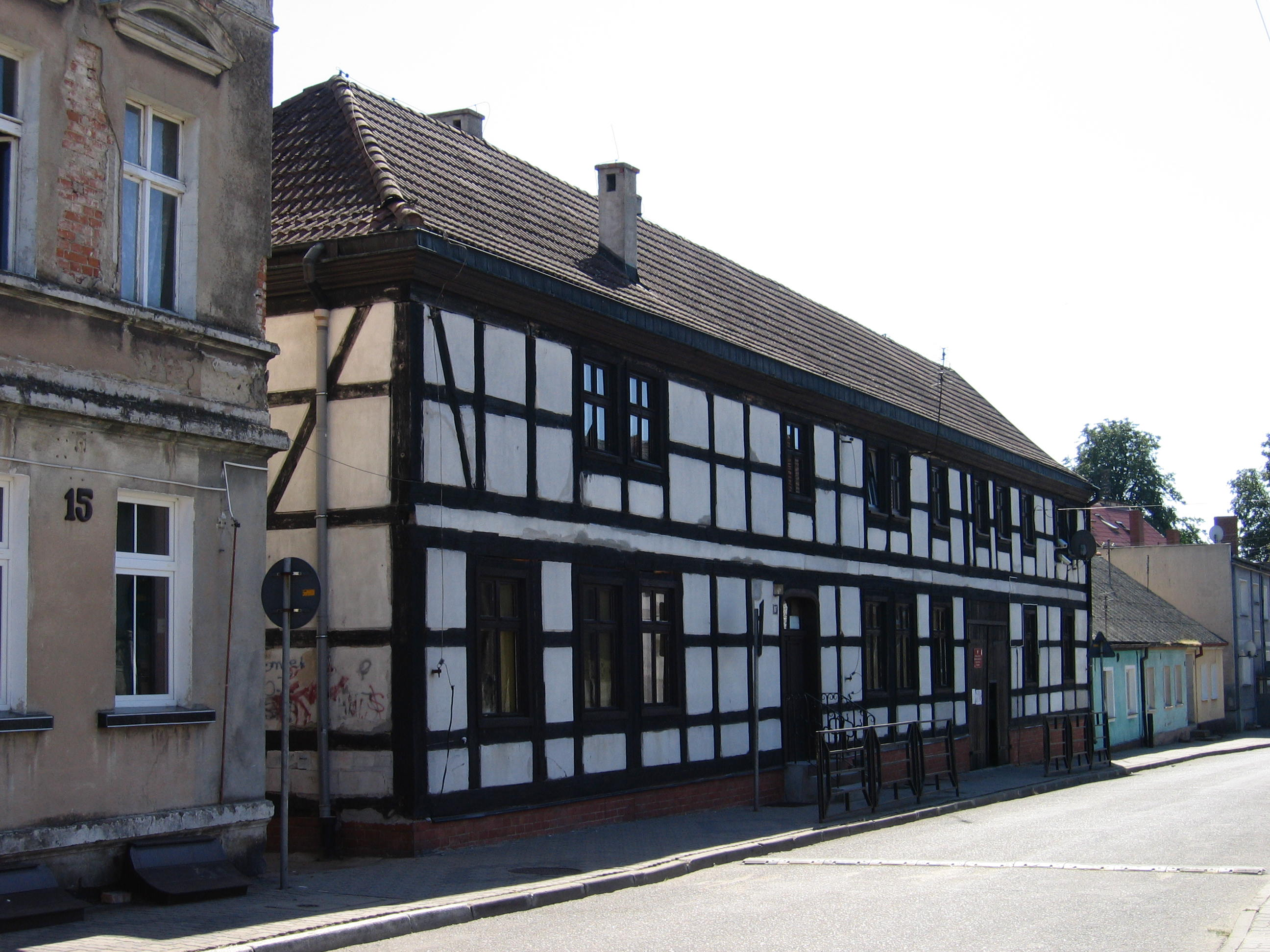 Lipiany, ul. Szkolna 17 - dom, ob. biblioteka (szach.)